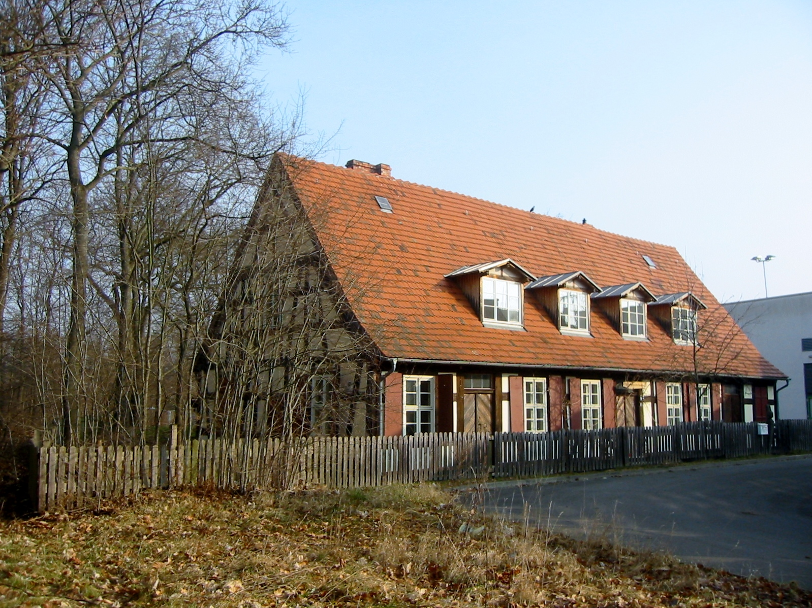 Denkmalgeschütztes Gärtnerhaus im Bellevuepark in Berlin-Köpenick